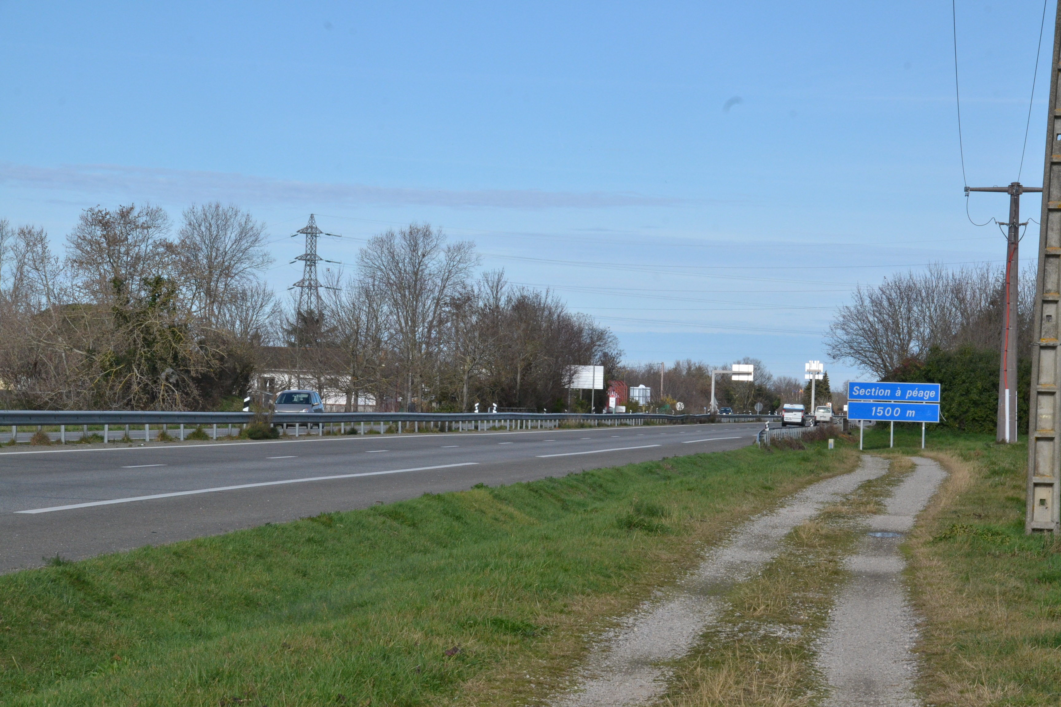 La route nationale 20 à Pamiers (Ariège, France), peu avant le début de l'autoroute A66.